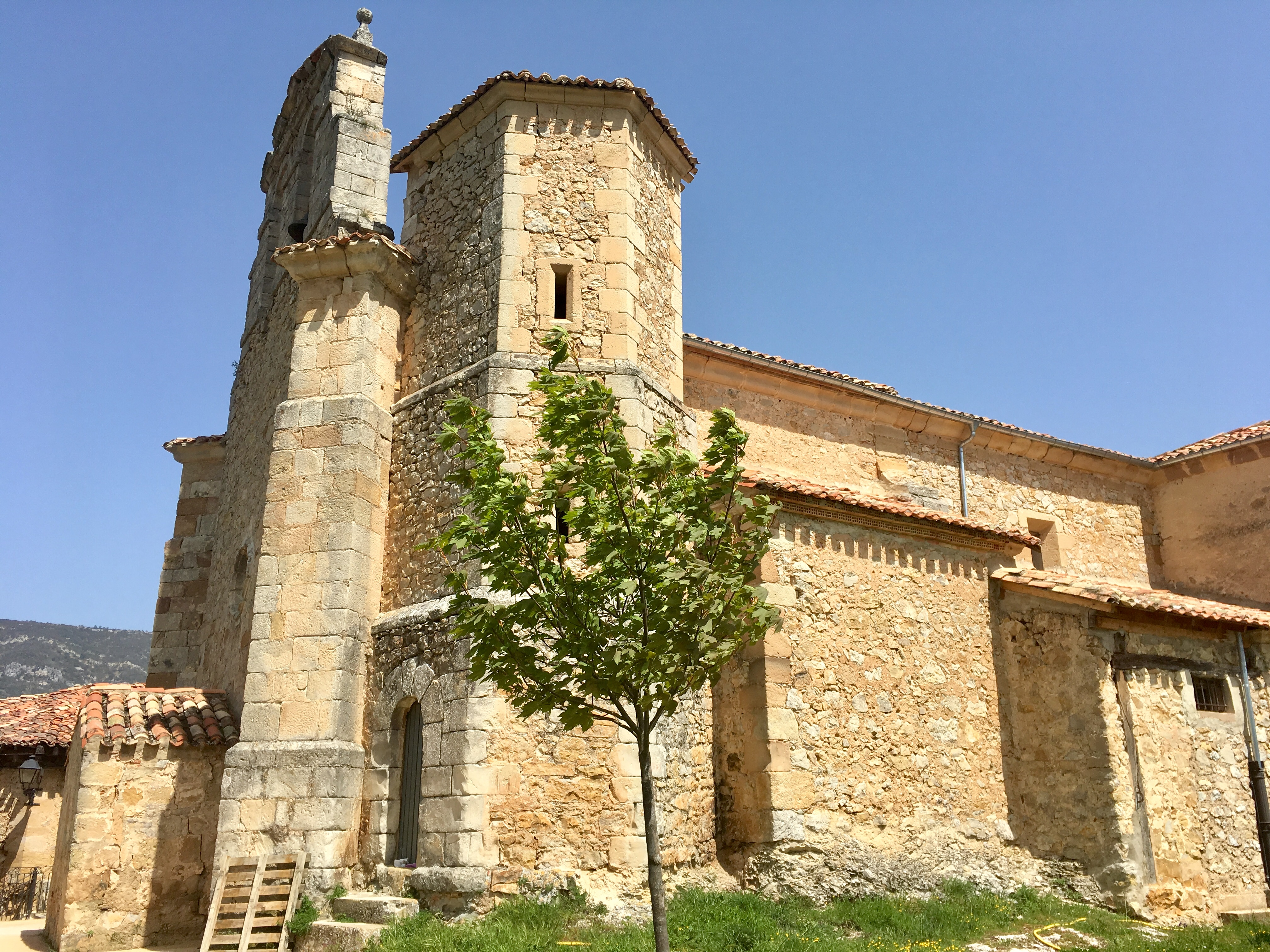 Cantabrana